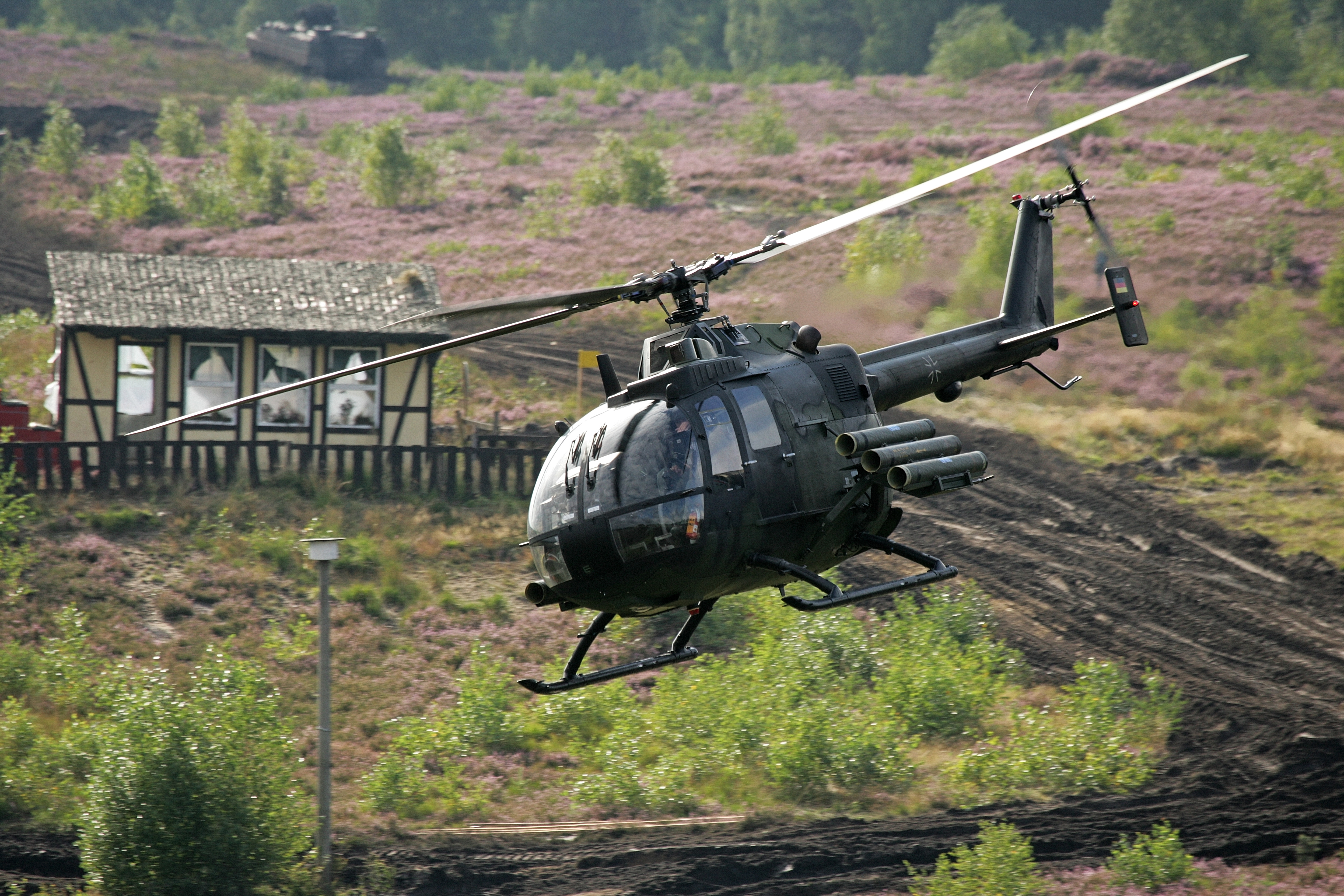 Panzerabwehrhubschrauber BO 105 (PAH). Vorüben der Informationslehrübung Heer. Die Panzerlehrbrigade 9 stellt vom 4. bis 10. September die Fähigkeiten des deutschen Heeres auf dem Truppenübungsplätzen Munster und Bergen vor. Unterstützt wird die Lehrbrigade dabei vom Ausbildungszentrum Munster. In diesem Jahr wird das heutige und zukünftige Aufgabenspektrum des deutschen Heeres in dieser Lehrübung dargestellt. Die Informationslehrübung richtet sich in erster Linie an den Führernachwuchs der Bundeswehr, der Offizierschule des Heeres und Soldaten ausländischer Streitkräfte. ©Bundeswehr/Mandt